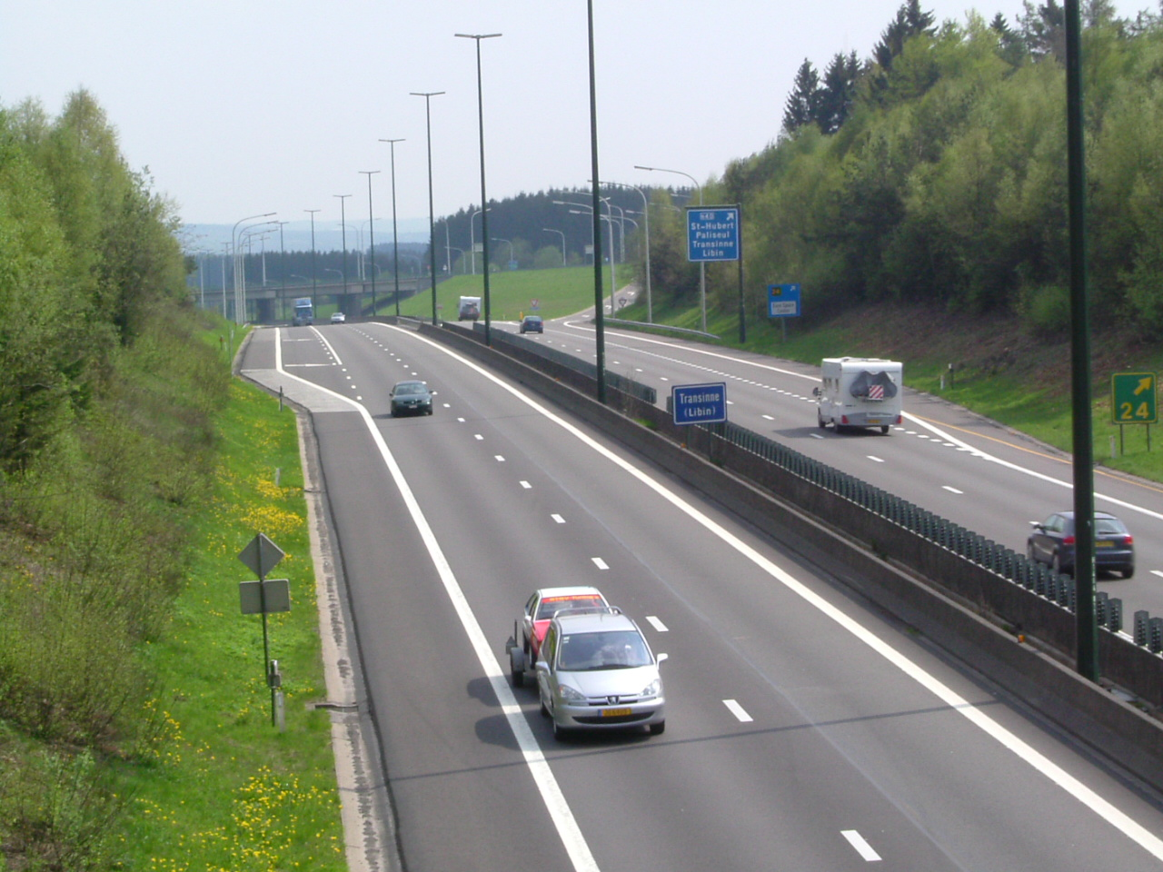 Photo de la E411 prise depuis un pont.